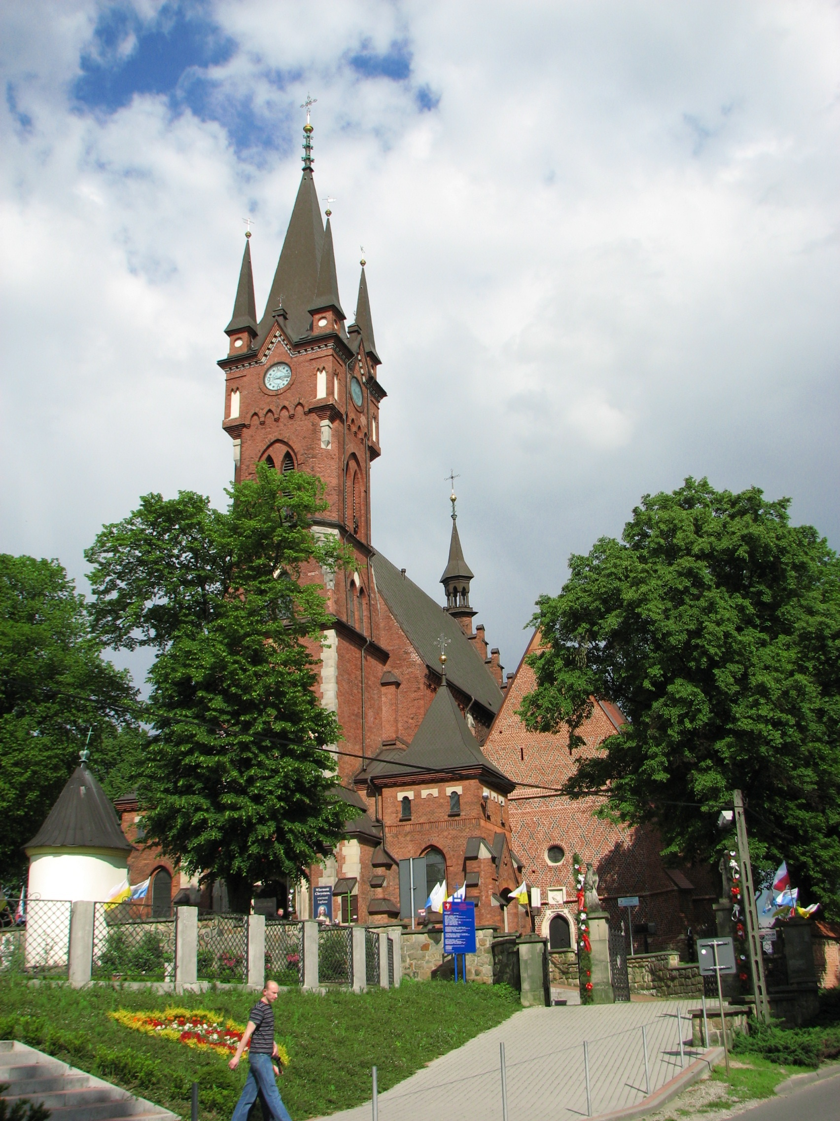 Szczepanów - kościół parafialny pw. św. Marii Magdaleny, 1470, 1914, obecnie bazylika mniejsza